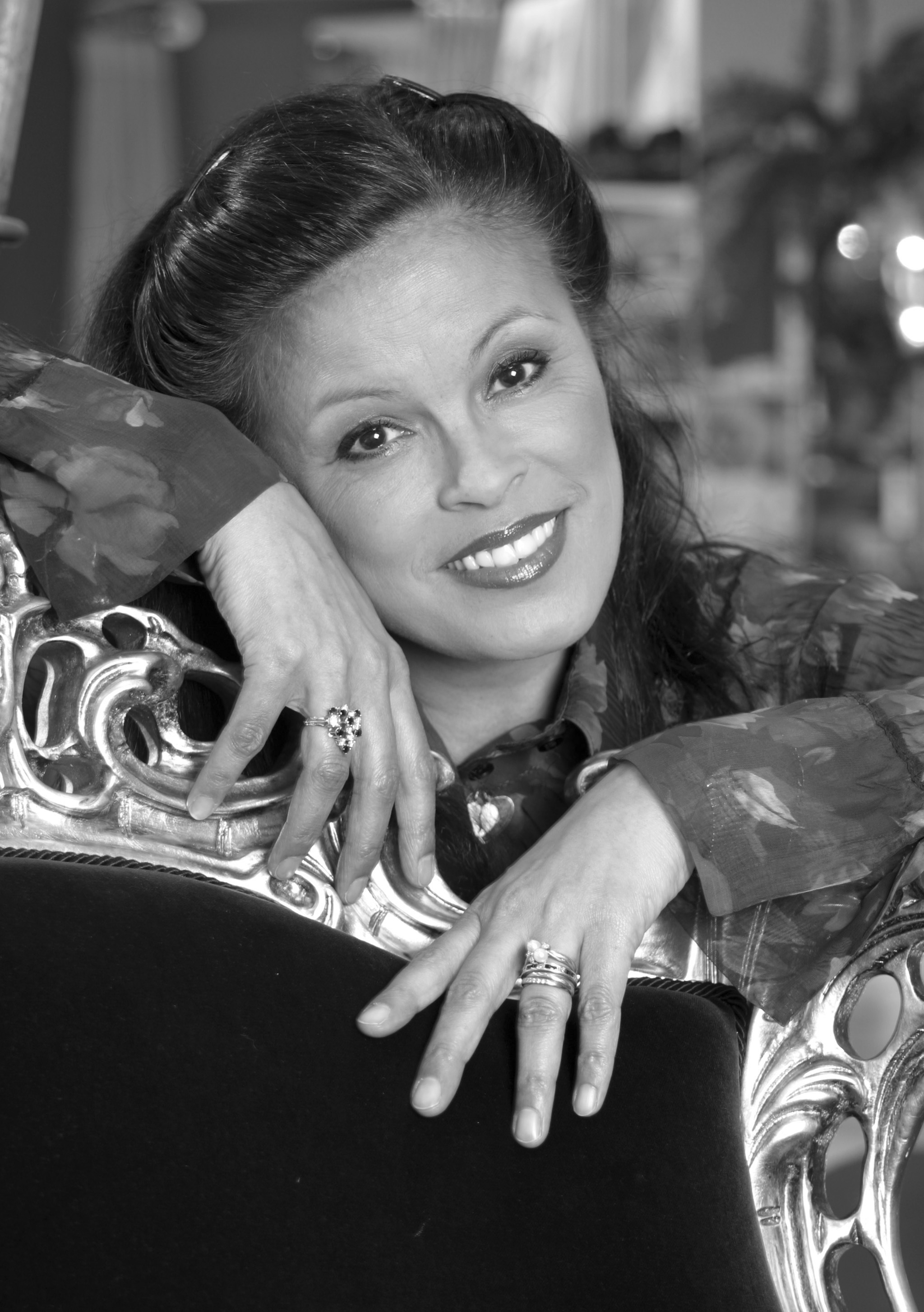 Stella Maessen (Zandvoort, 6 augustus 1953) is een Nederlandse zangeres. Ze was vier keer deelnemer aan het Eurovisiesongfestival.